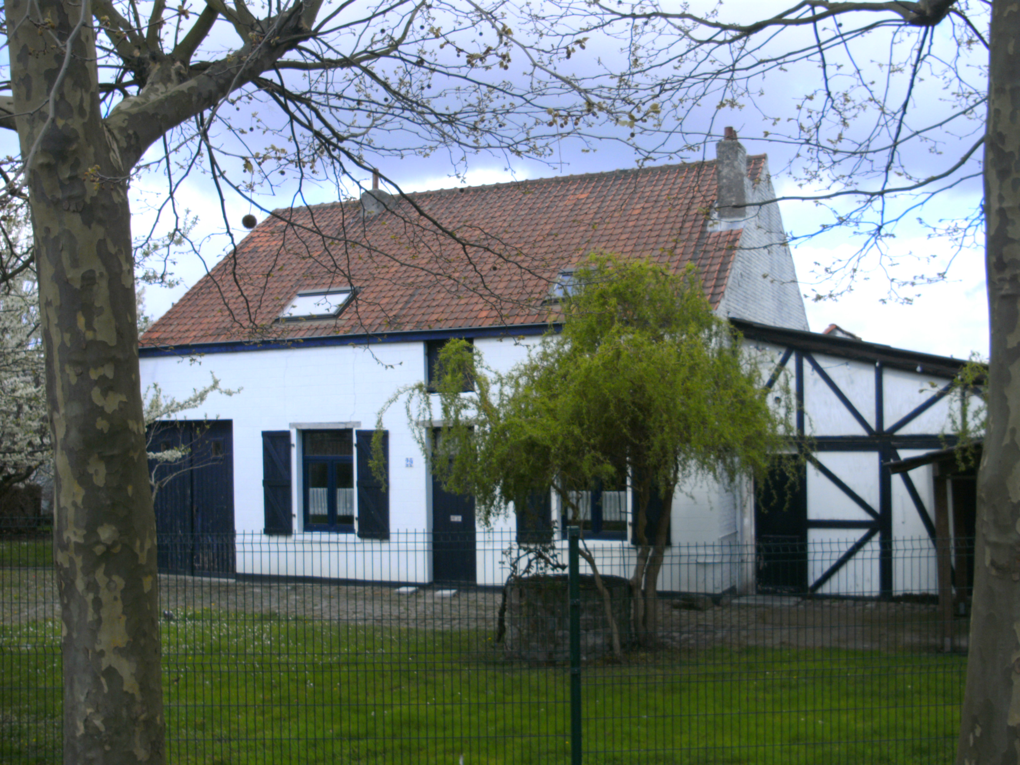 Fermette dite "du Geuzenberg" et musée de la witloof à Evere. Date de construction : 1891